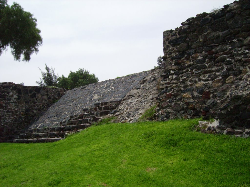 Fotografía de la zona arqueológica ("Los Pochotes")